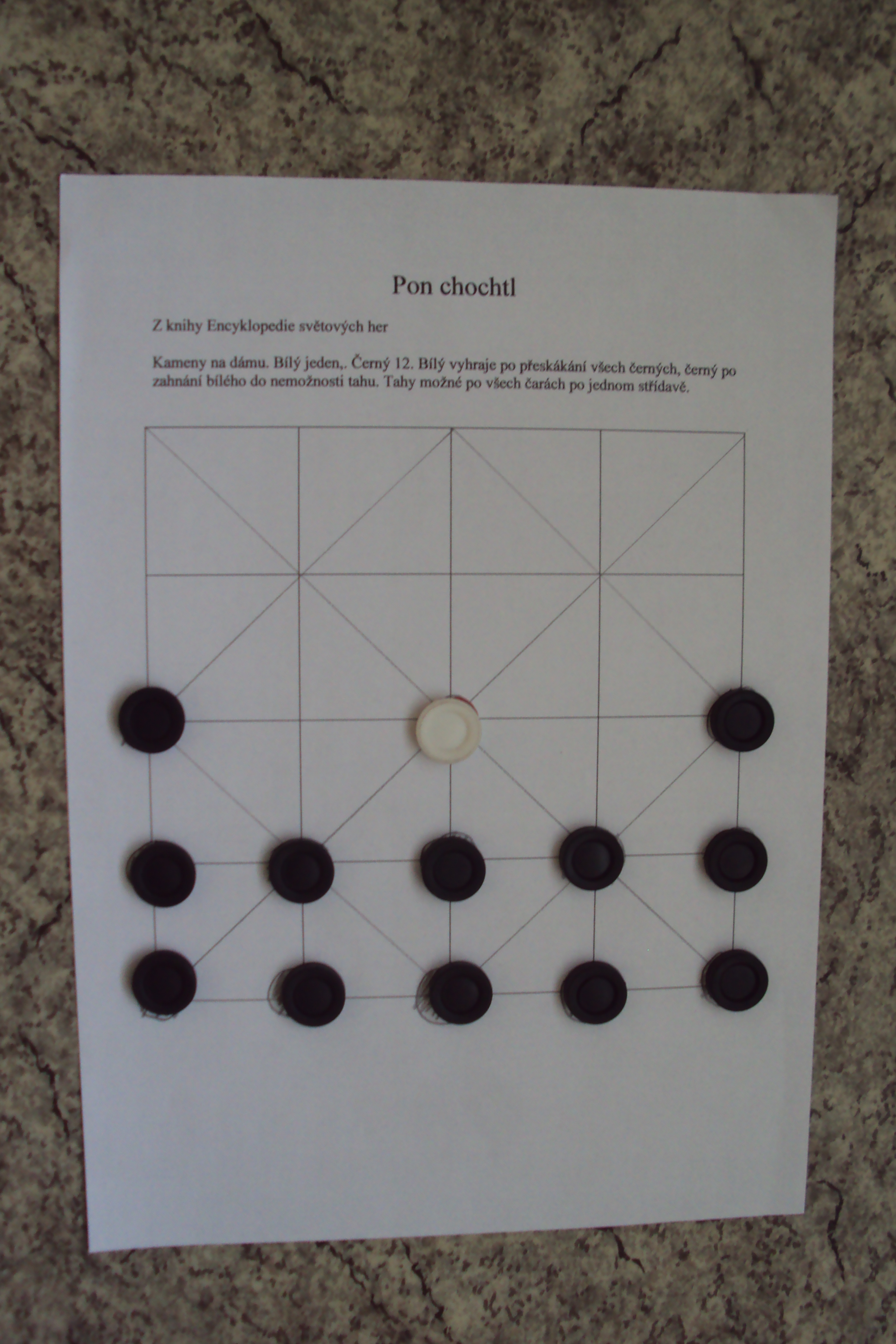 Desková hra vyrobená podle Encyklopedie her, úvodní postavení kamenů, varianta hry Adugo